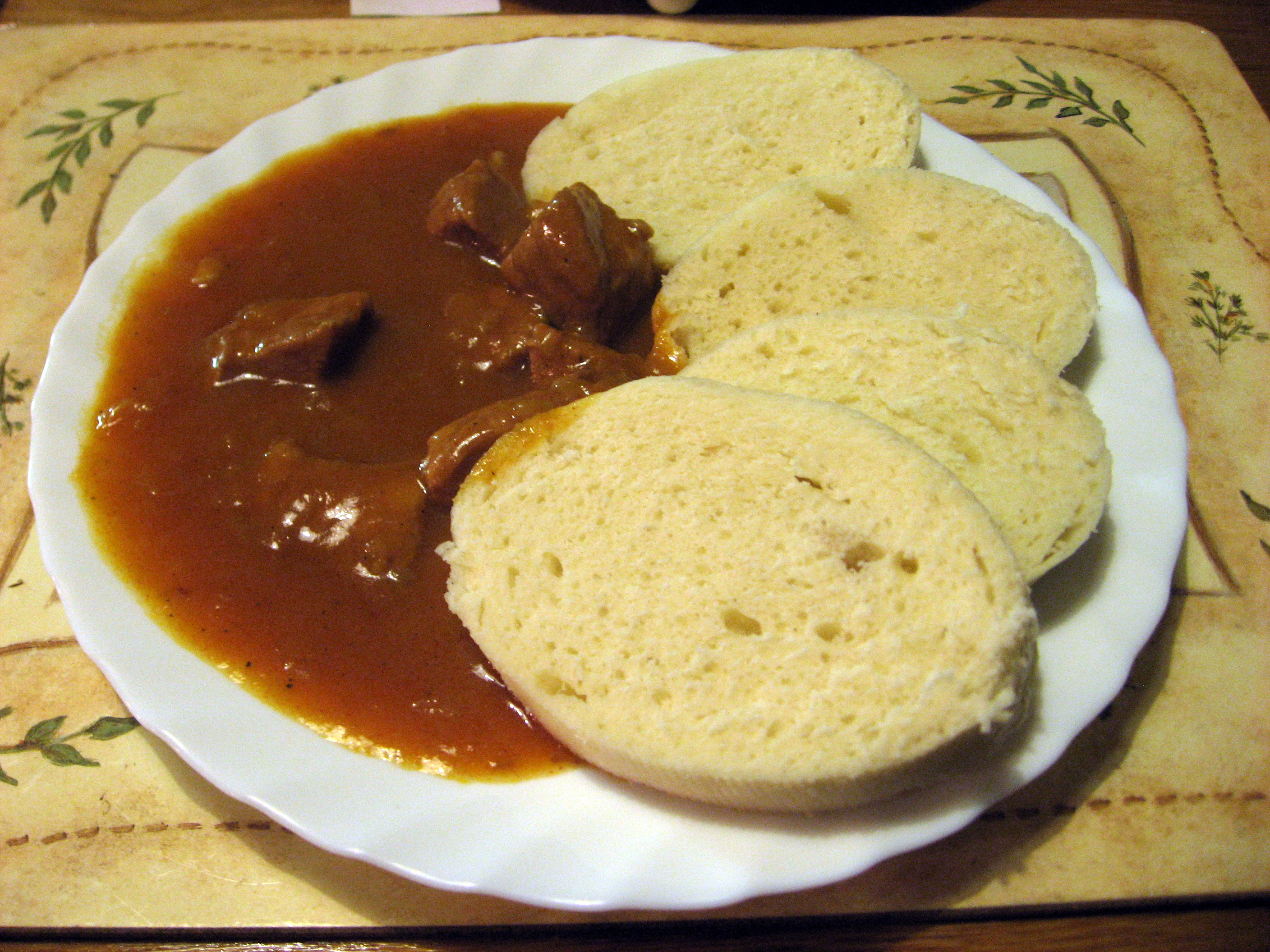 Guláš s houskovými hnedlíky